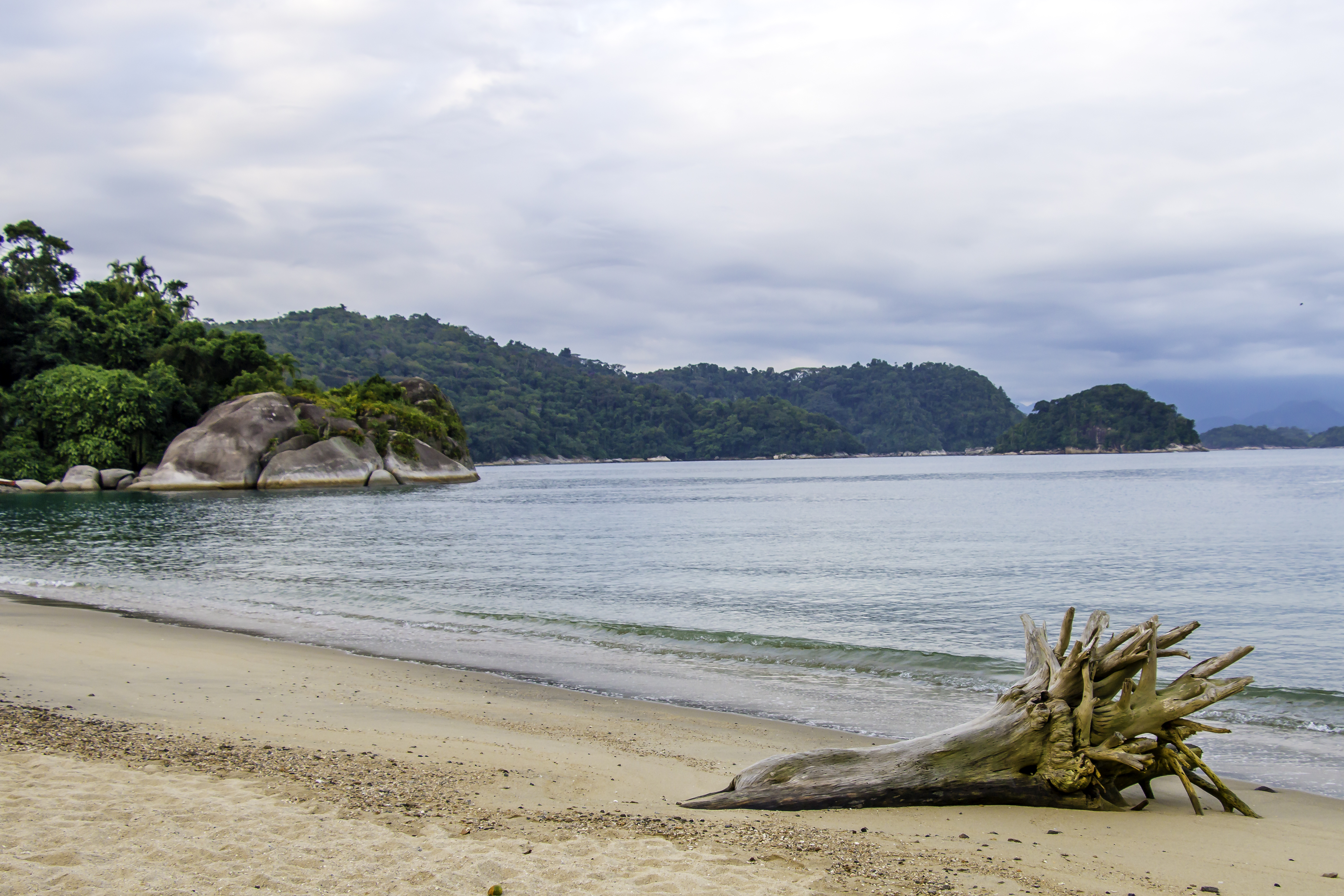 Esta praia quase deserta está localizada em Itaorna, próximo à Usina de Angra dos Reis. Existem muitas tartarugas nadando em suas águas aquecidas devido a sua utilização no resfriamento secundário das turbinas da usina, mostrando que a natureza sobrevive.